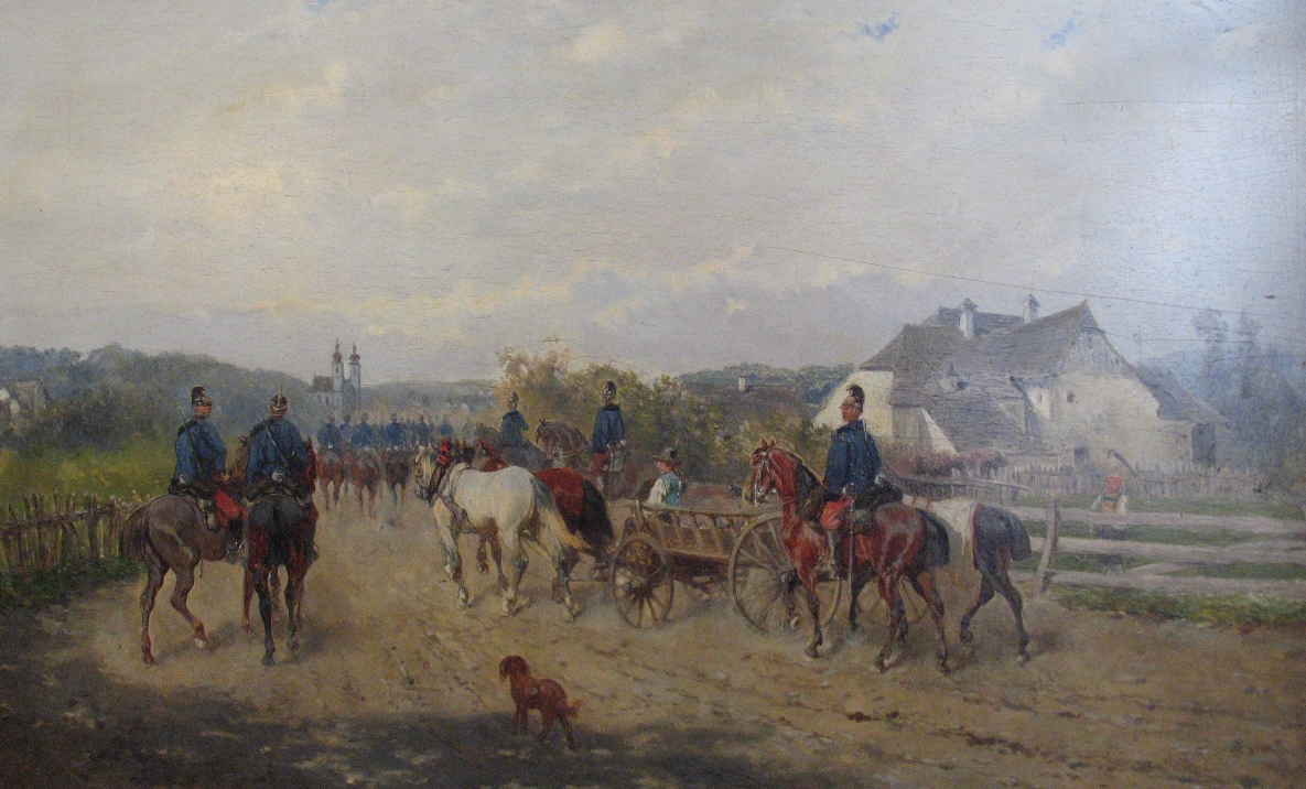 Dragoner des Niederösterreichischen Dragoner-Regiments „Friedrich August König von Sachsen“ Nr. 3 auf dem Marsch